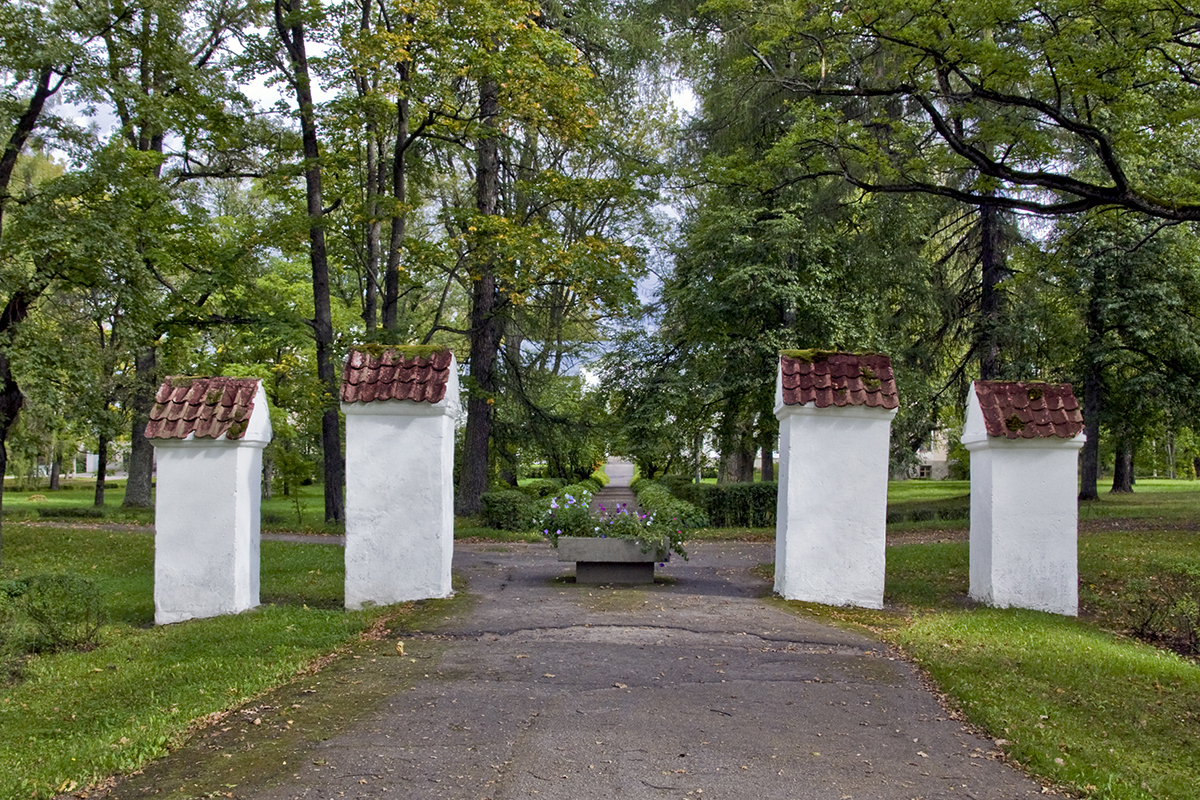 Malnavas muižas un Malnavas simbols "Baltie vārti"